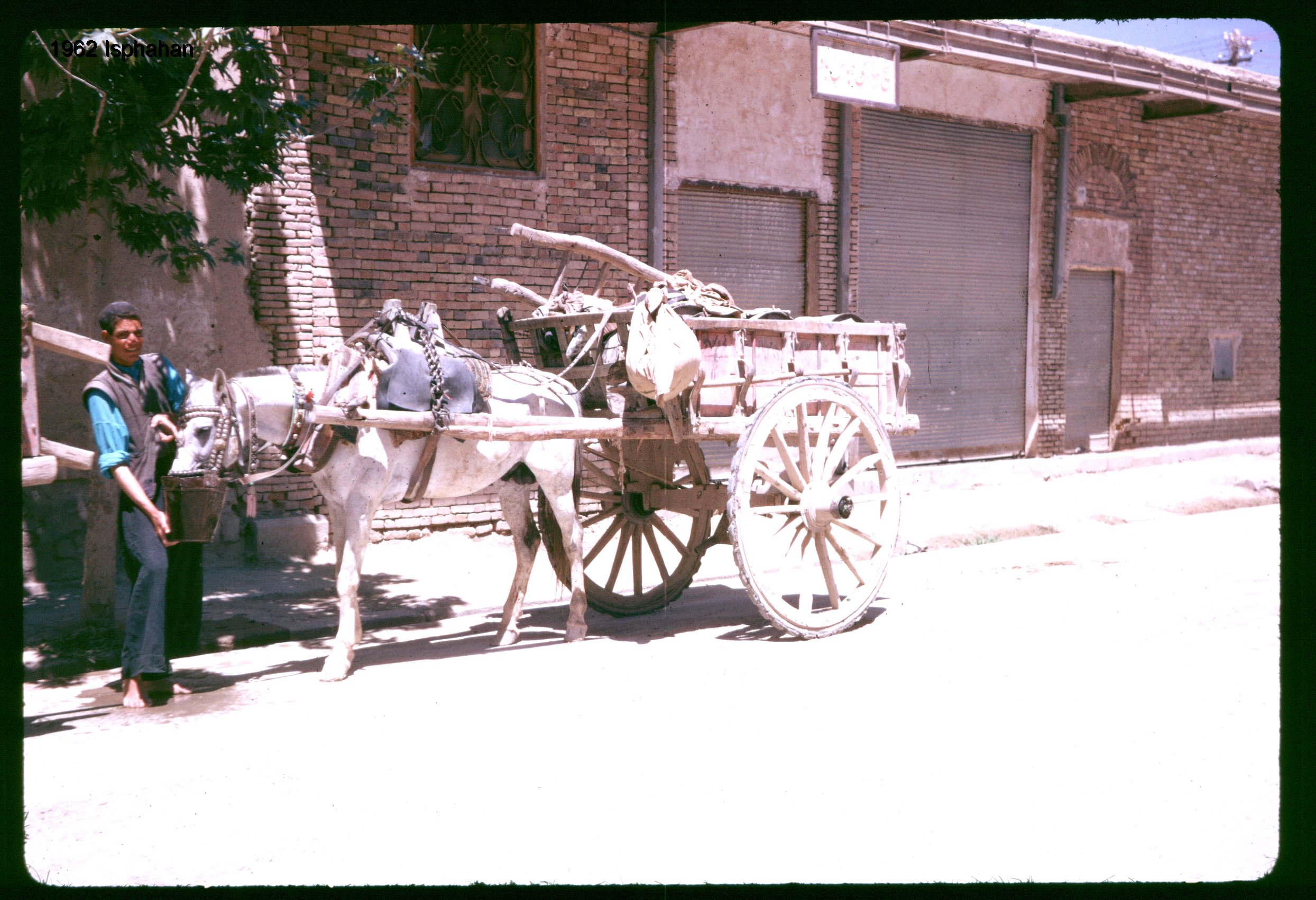 1962 Isphahan (3187670553)